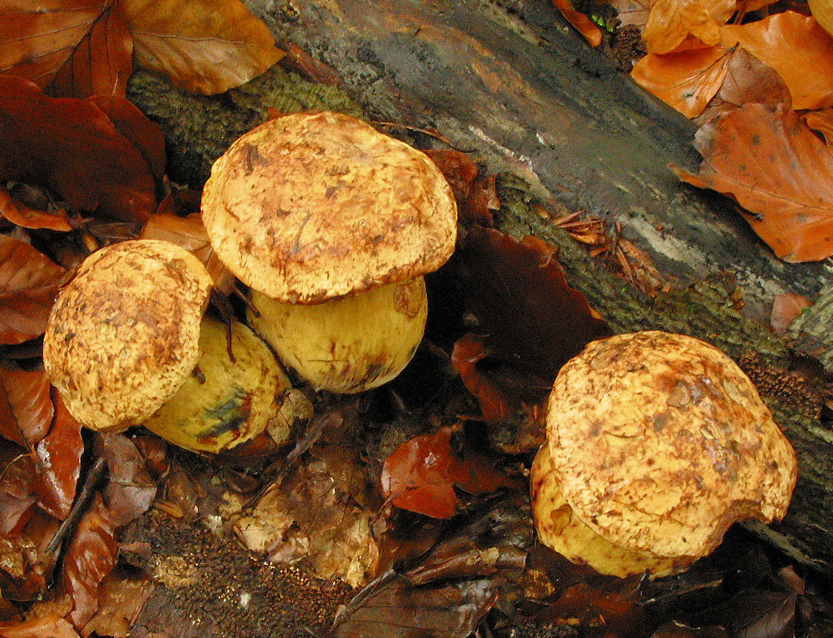 Boletus junquilleus (Belgique)/(Belgium), forêt de hêtres et de chênes./beeches and oaks forest.